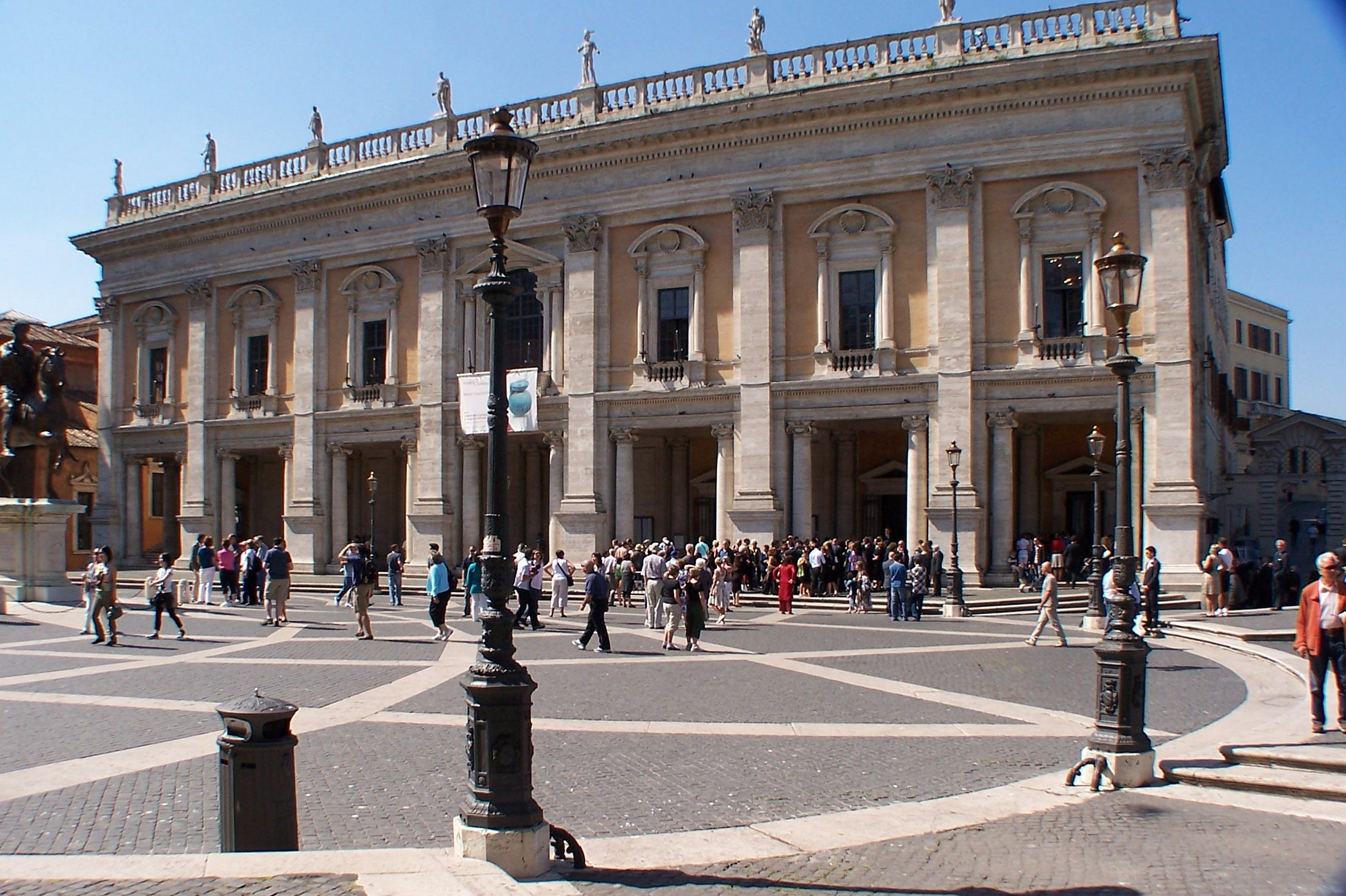 Palazzo dei Conservatori, Kapitol, Rom